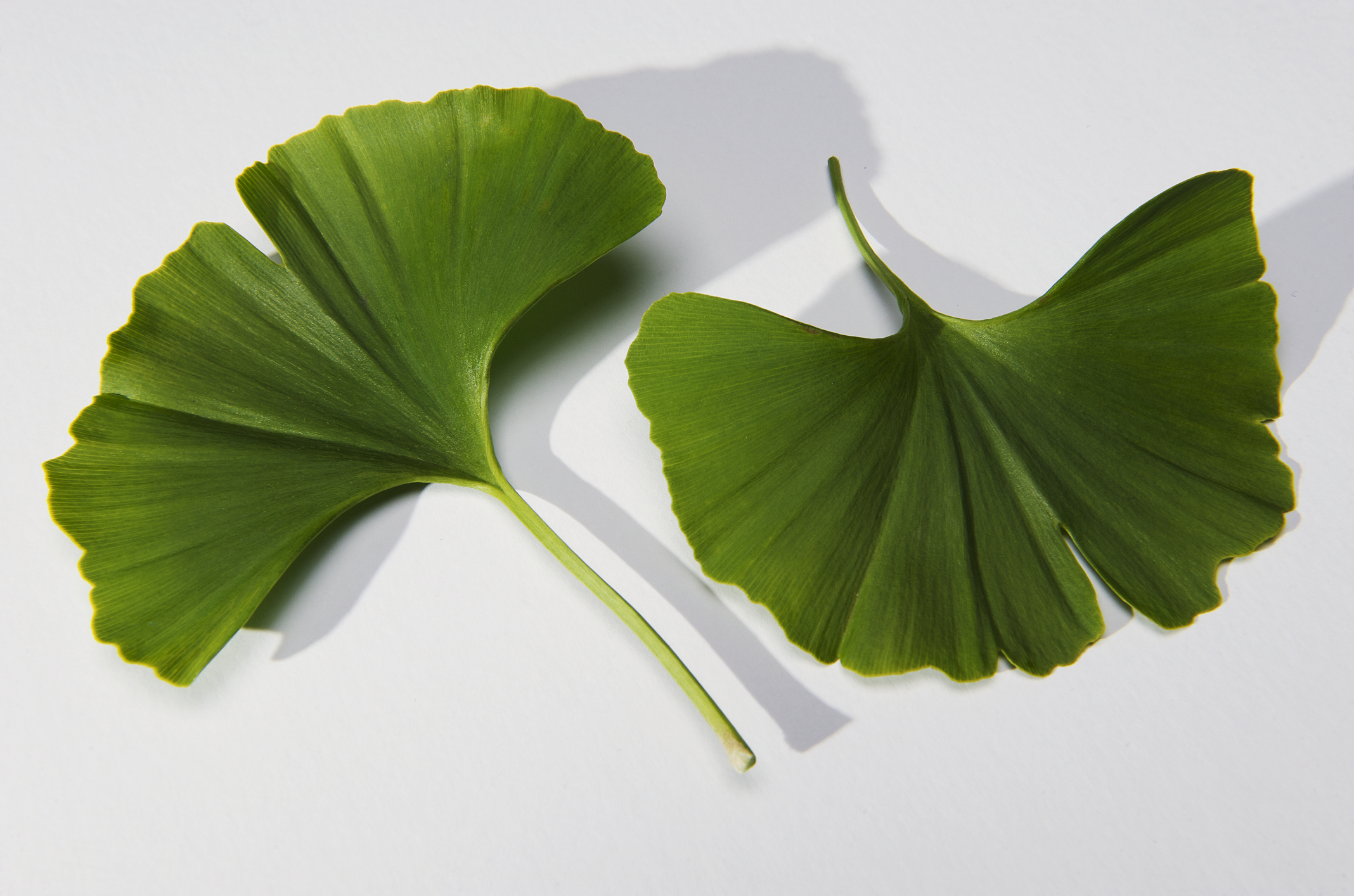 Gingko Leaf